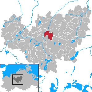 Plaaz in Mecklenburg-Vorpommern - District Güstrow